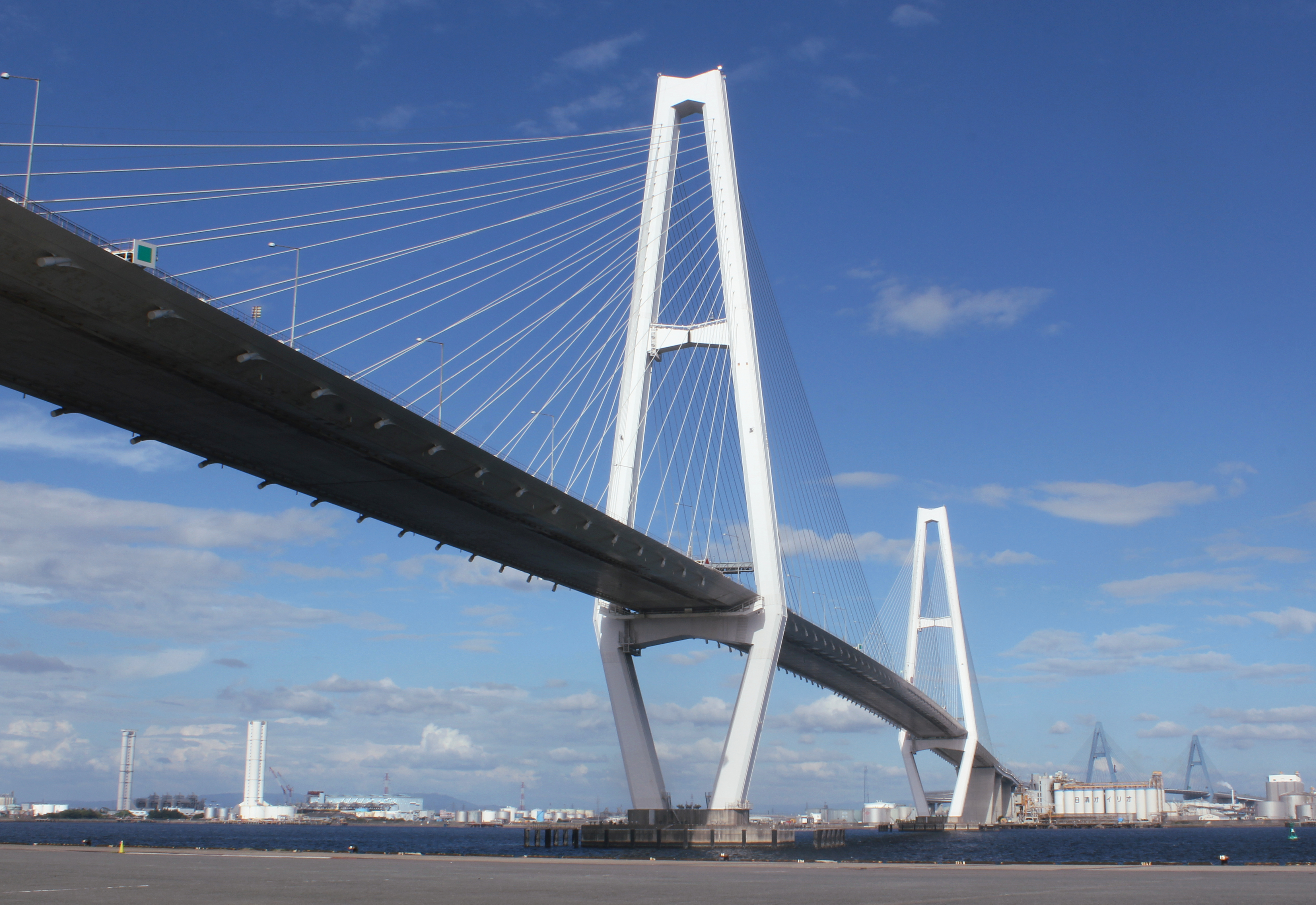 名港中央大橋 金城ふ頭から撮影